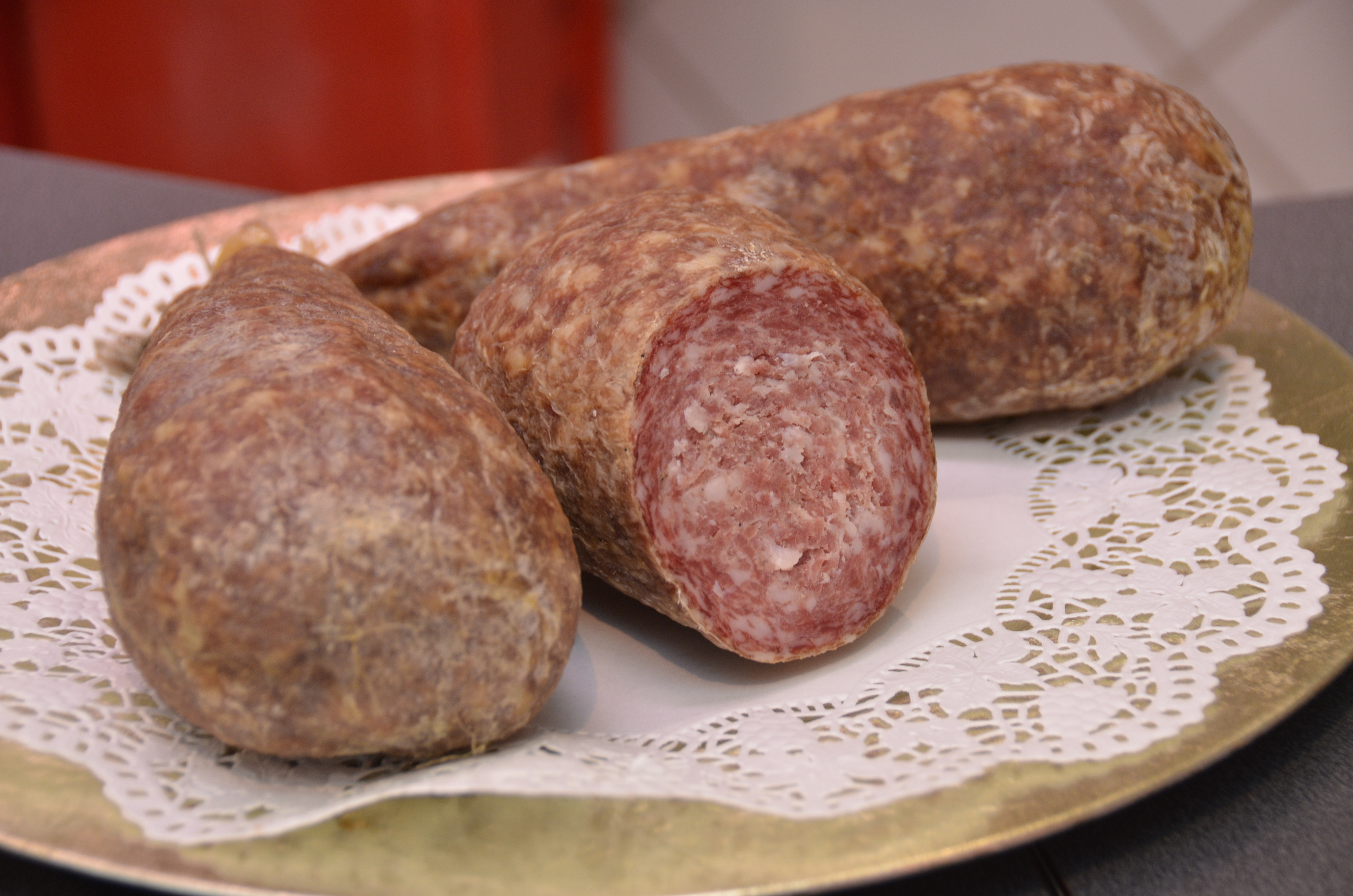 Typische Eichsfelder Kälberblase(n). Eine regionale Wurstspezialität.